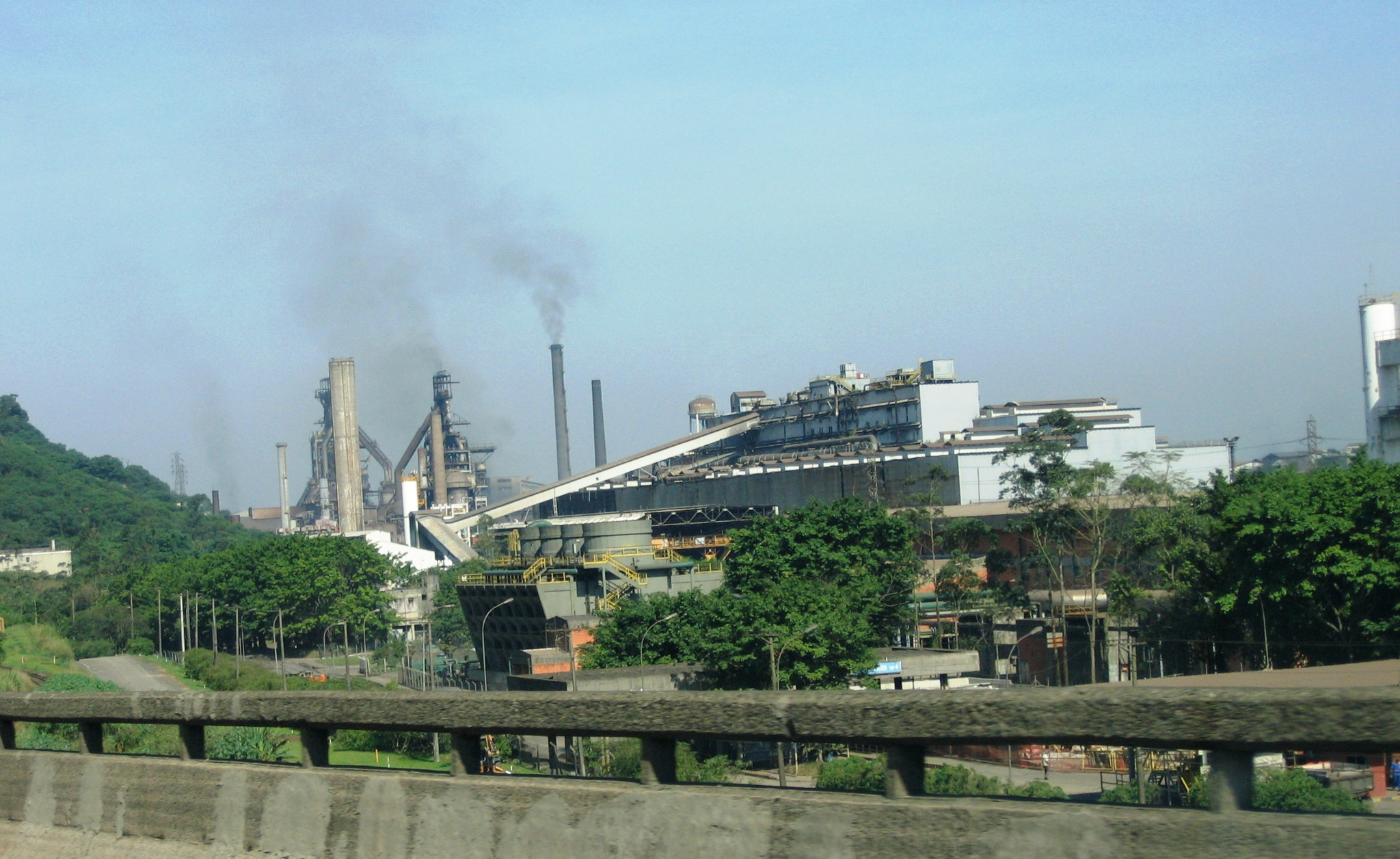 Companhia Siderúrgica Paulista - COSIPA